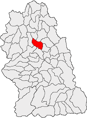 Categorie:Hărţi ale judeţului Hunedoara